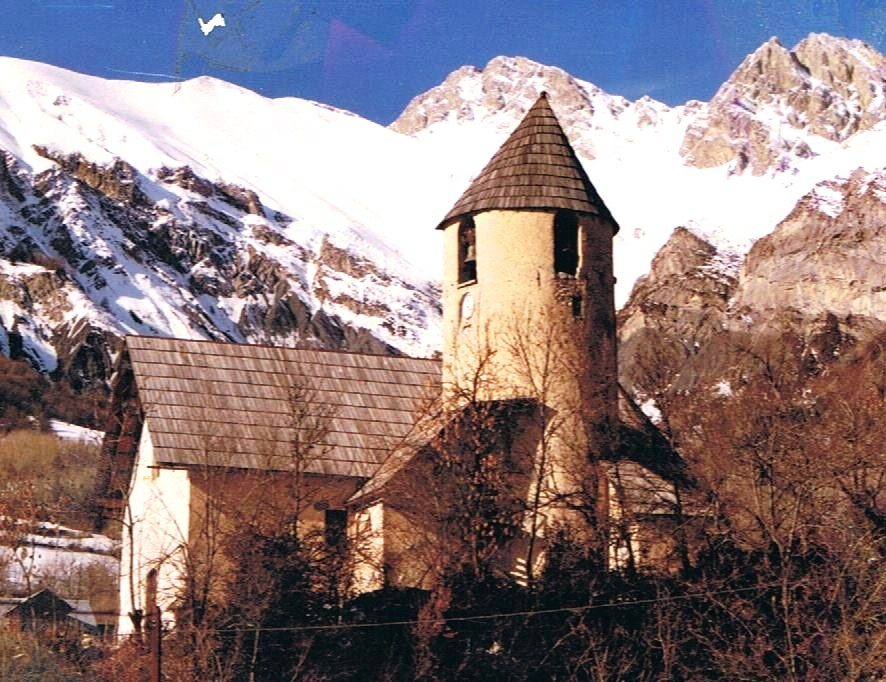 Église paroissiale d'Entraunes vue de l'Est (rive gauche du Bourdoux) avec son curieux clocher asymétrique demi circulaire. Et, au-dessus de celui-ci, les deux dents de la tête de l'Encombrette (2 681 m)